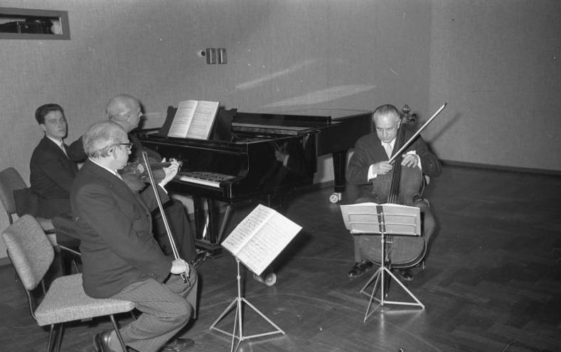 Kammerkonzert des Kölner Trios, anl. der 3. Internationalen Direktoren-Konferenz der Europäischen Vereinigung der Akademien, Konservatorien u. Musikhochschulen in der Bonner Beethovenhalle